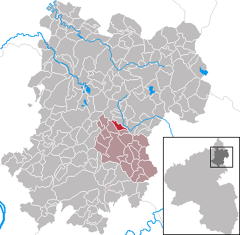 Elbingen in Rhineland-Palatinate - Westerwaldkreis